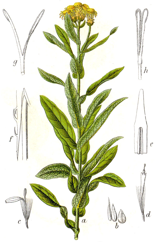 Inula germanica L. Original Caption Deutscher Alant, Inula germanica